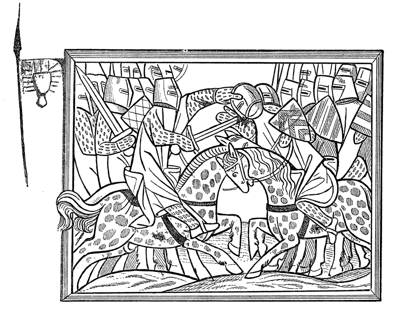 Slaget ved Bornhøved 1227